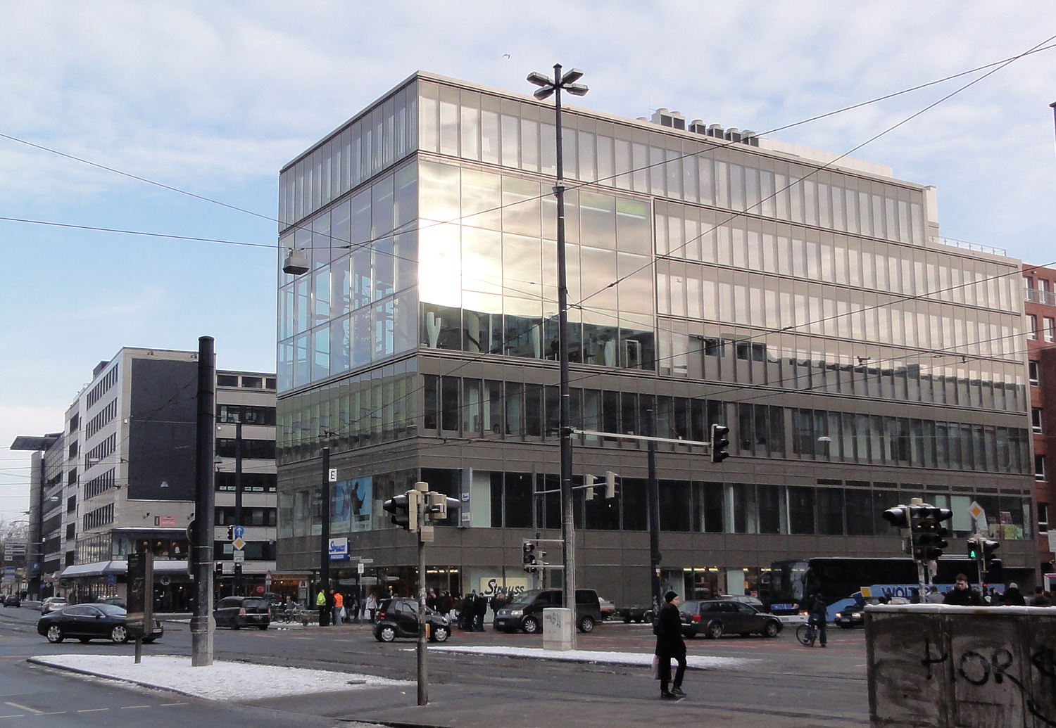 das „Brillissimo“ an der Ecke Hutfilterstraße/Am Brill in Bremen entstand bis 2010 nach einem Entwurf der Architekten Grüntuch Ernst (Berlin)